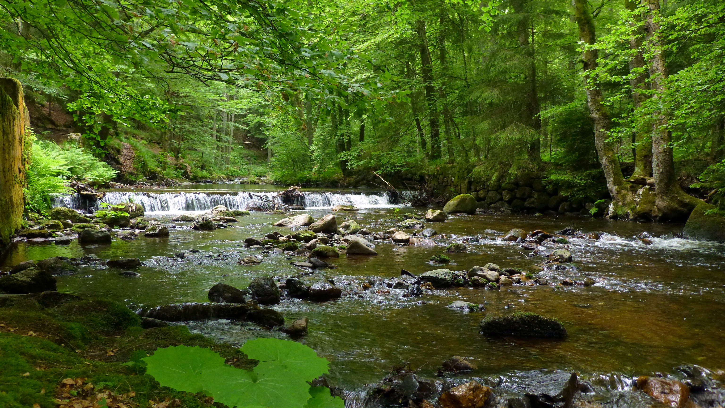 Die Kalte Bode fließt durch das NSG Elendstal, hier in der Nähe des Dorfes Elend (Ortsteil der Stadt Oberharz am Brocken).